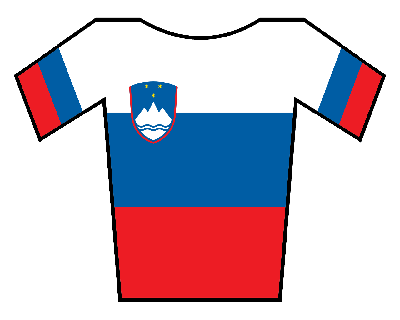 Maillot de Eslovenia